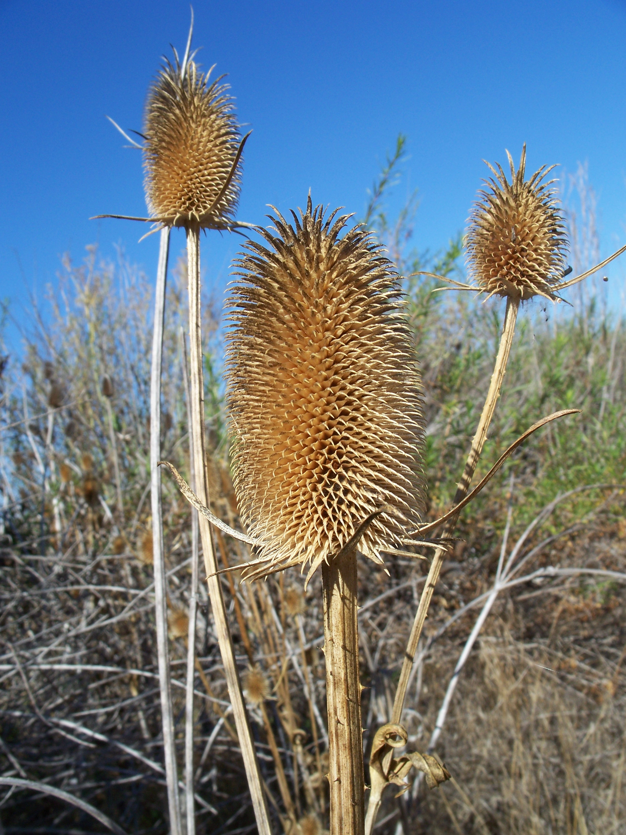 Dipsacus sativus Made in San Jose, California. Identified by Franz Xaver.